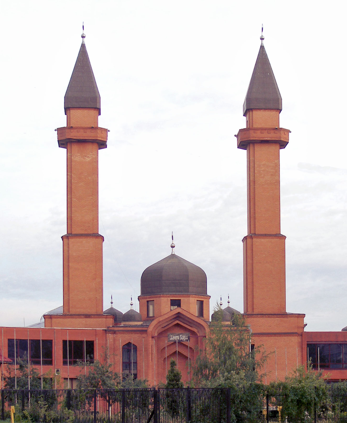 Новый Иерусалим